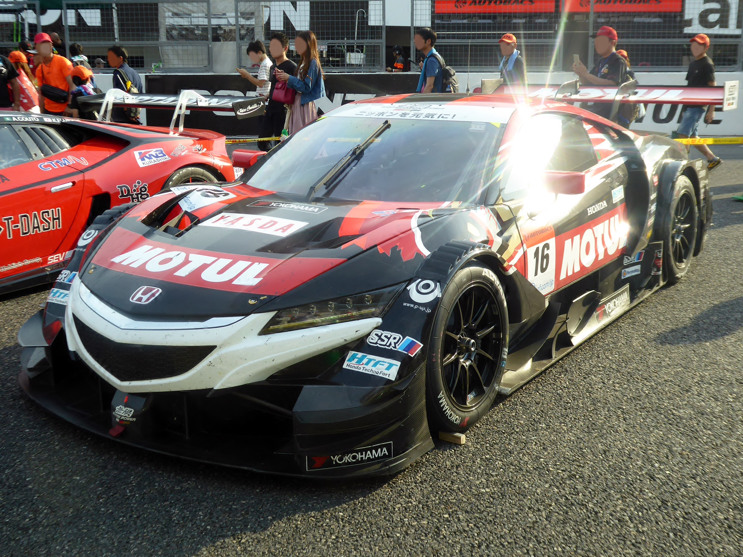 2019年鈴鹿GT300km終了後の16号車MOTUL MUGEN NSX-GTを撮影。